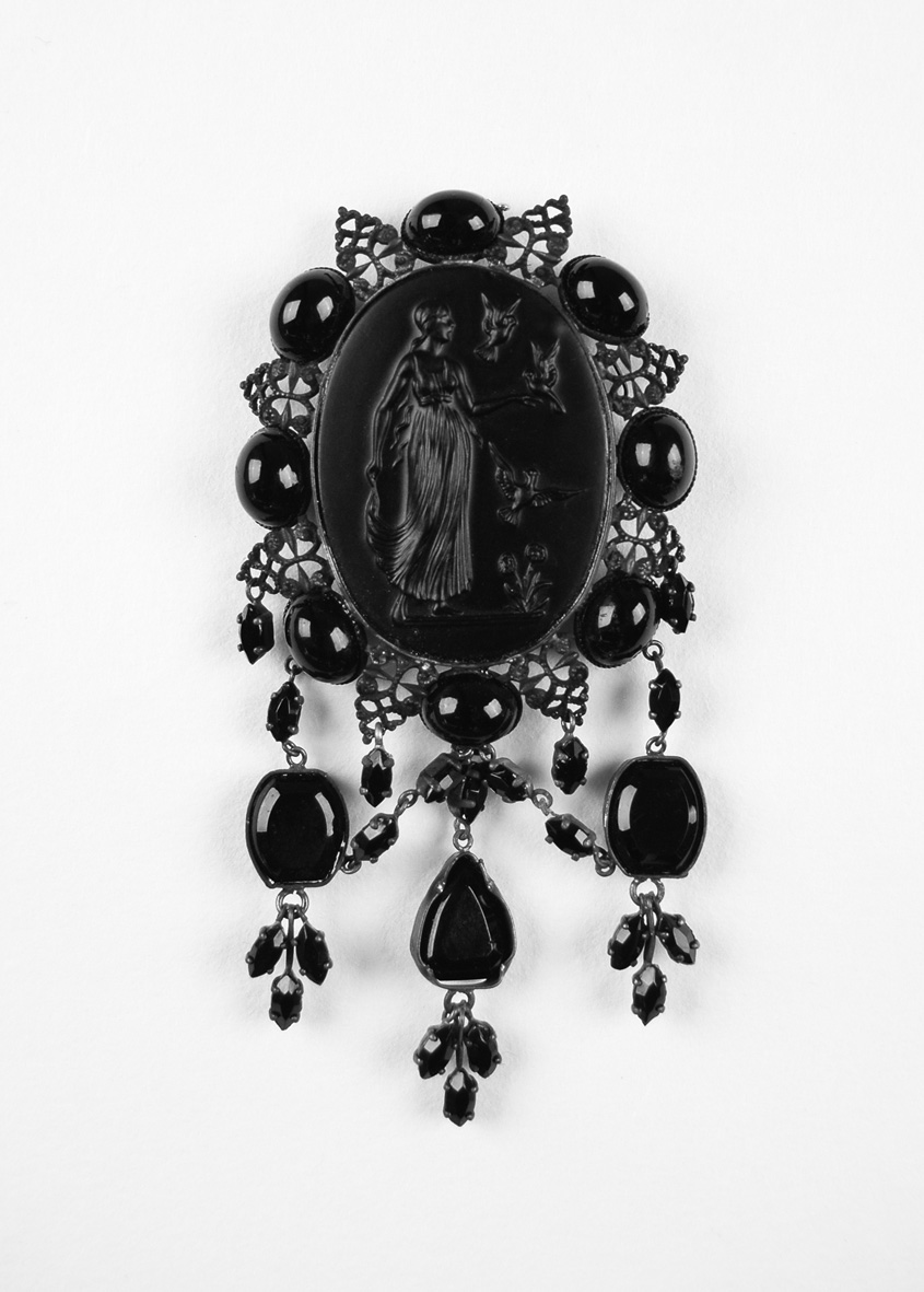 Trauerschmuck, Brosche, Glas, 19. Jahrh. (en: Mourning jewelry)